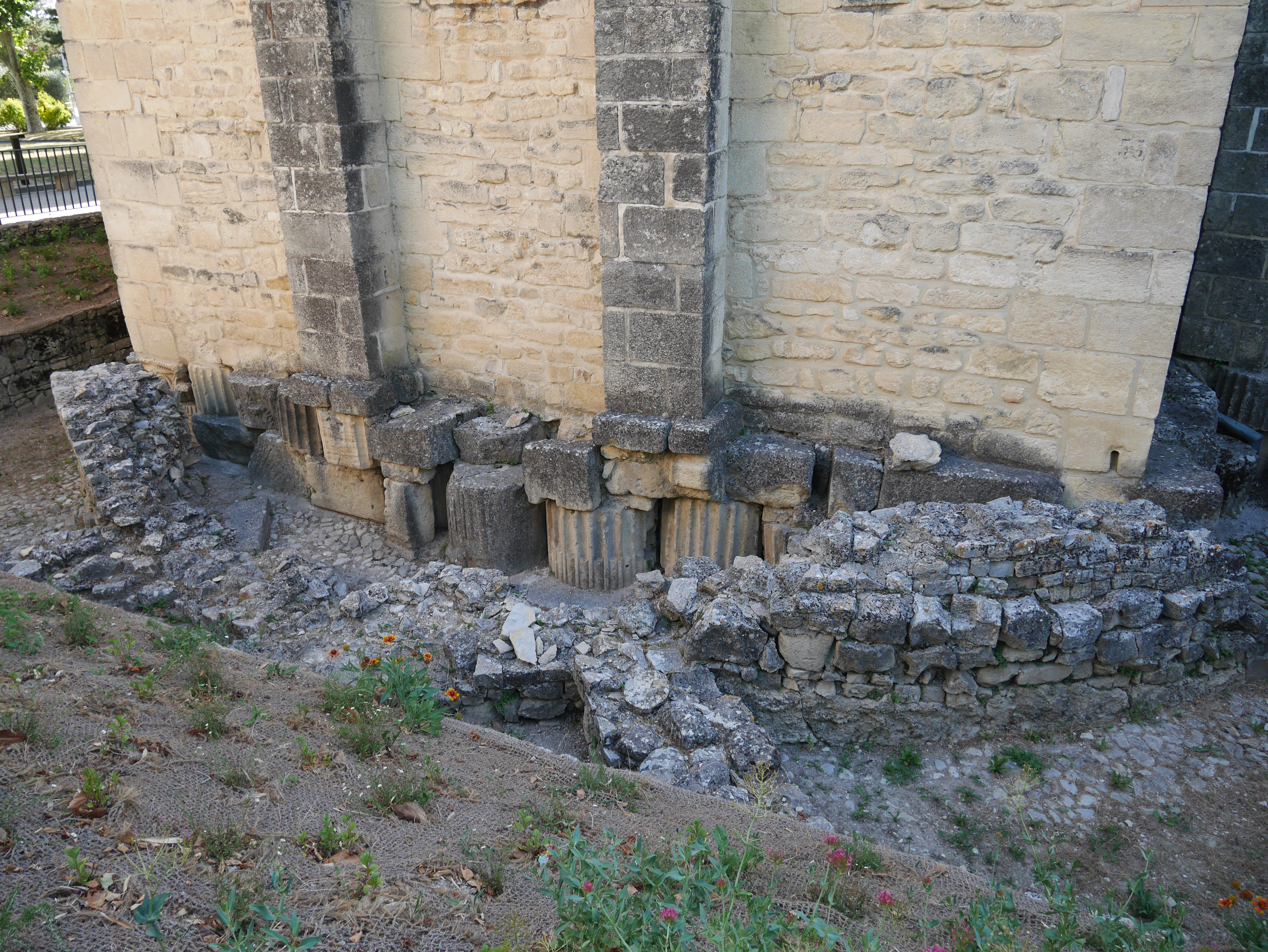 Foundations of cathédrale Notre-Dame-de-Nazareth de Vaison Fragmente